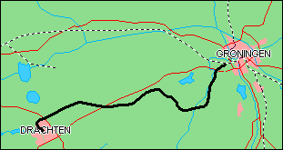 Fragment van de kaart van het tracé van Staatslijn B